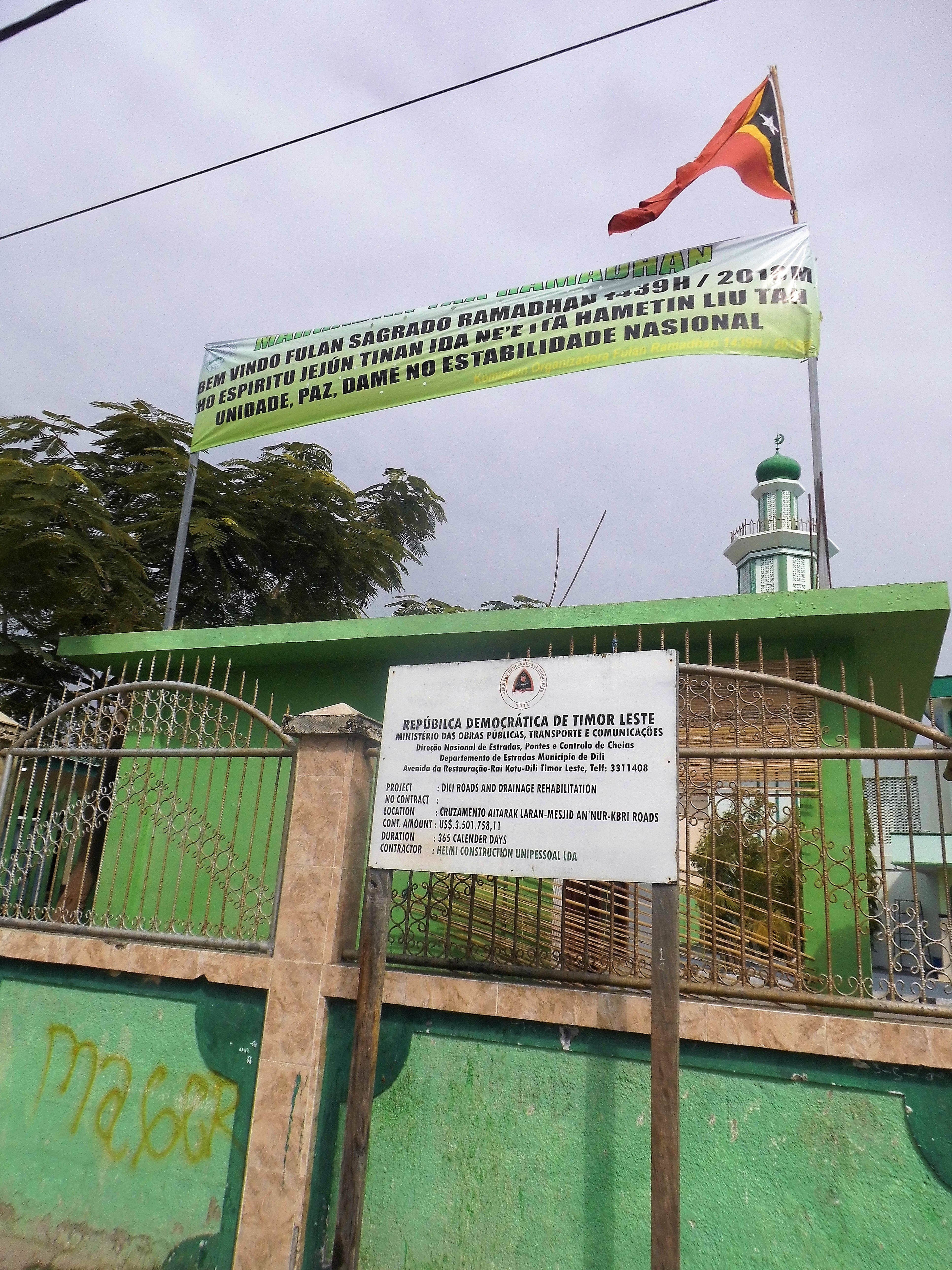 Annur-Moschee, Kampung Alor, Dili